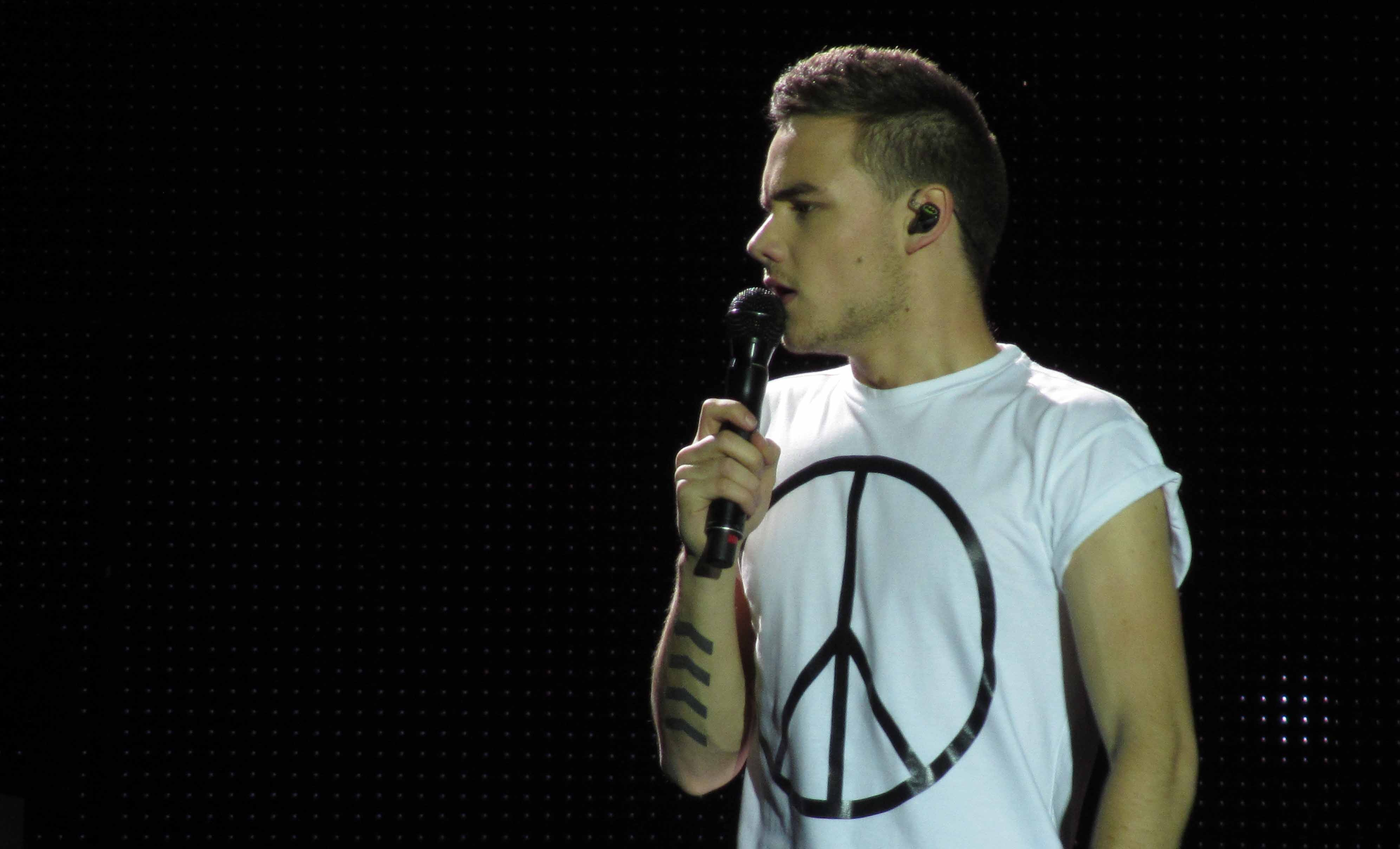 Liam Payne en el Take Me Home Tour de la SECC en Glasgow el 27 de febrero de 2013